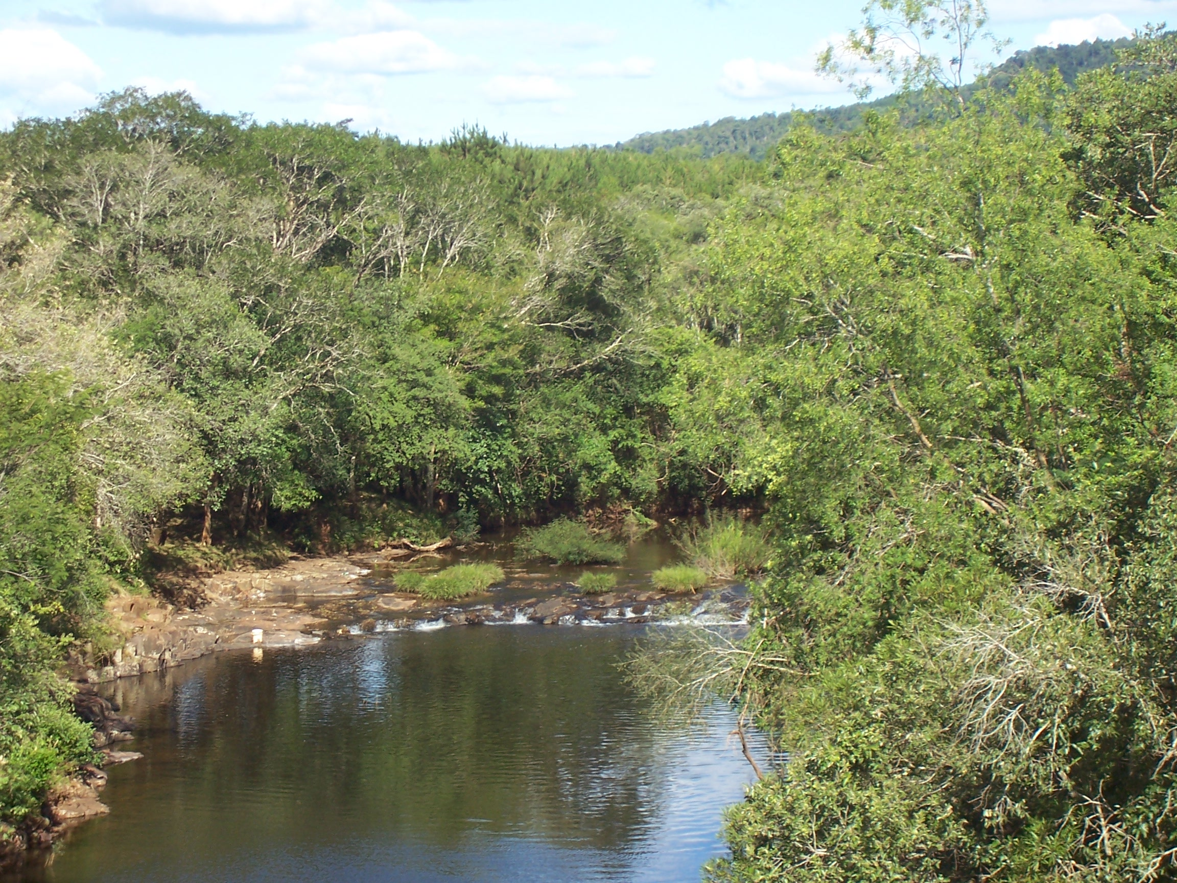 Los Saltos del Chapá, en el municipio de Colonia Alberdi, Misiones.